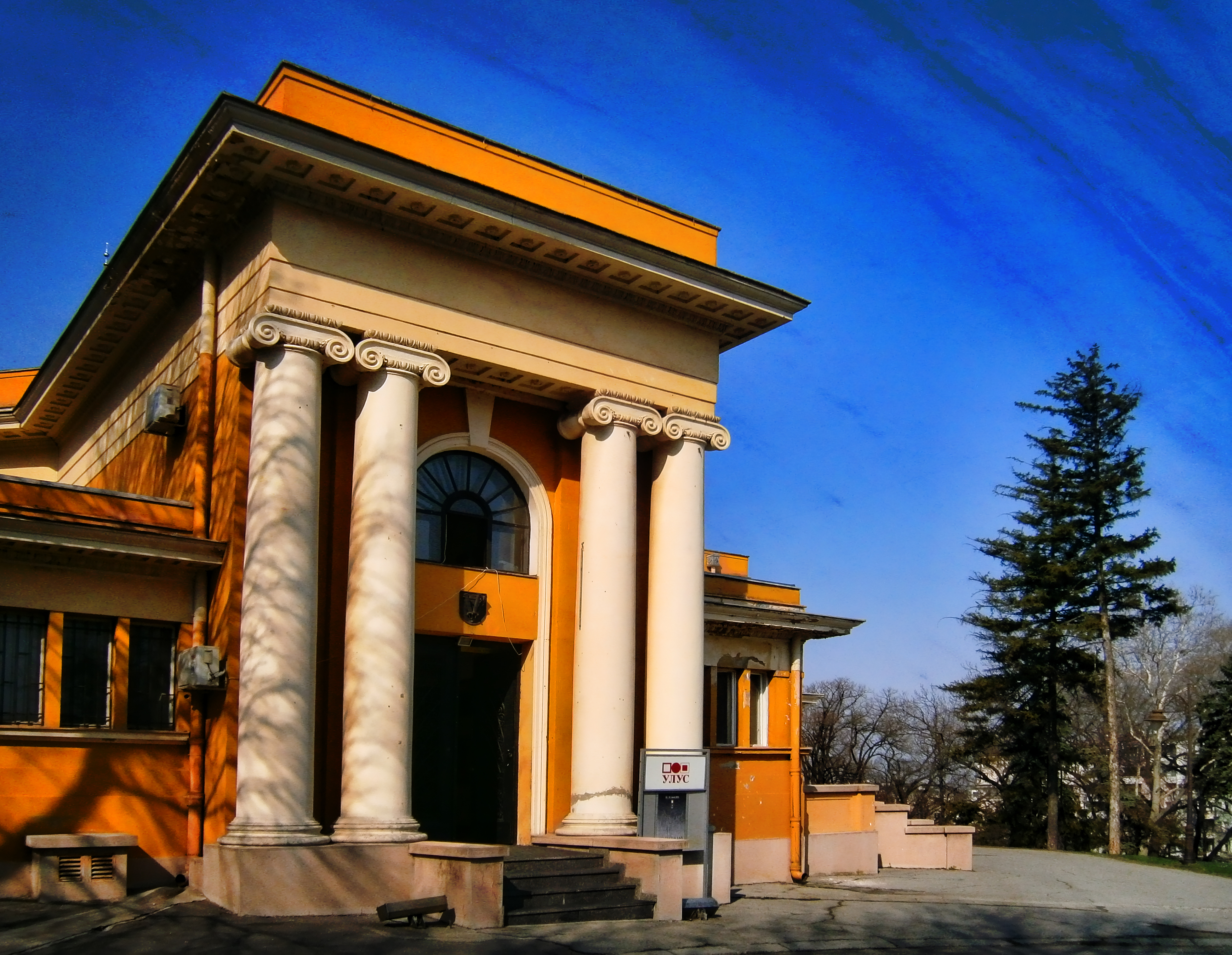 Уметничко одељење министарства просвете (са Нушићем на челу) расписује конкурс за пројекат уметничког павиљона, који је требало да се налази поред конака кнегиње Љубице. Прву награду је освојио архитекта Бранислав Којић.